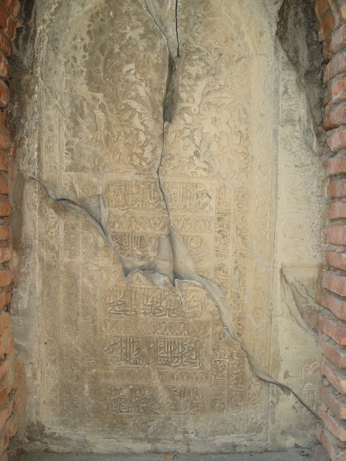 Fətəli xan Məhəmmədhüseyn xan oğlu (? -11.05.1815)